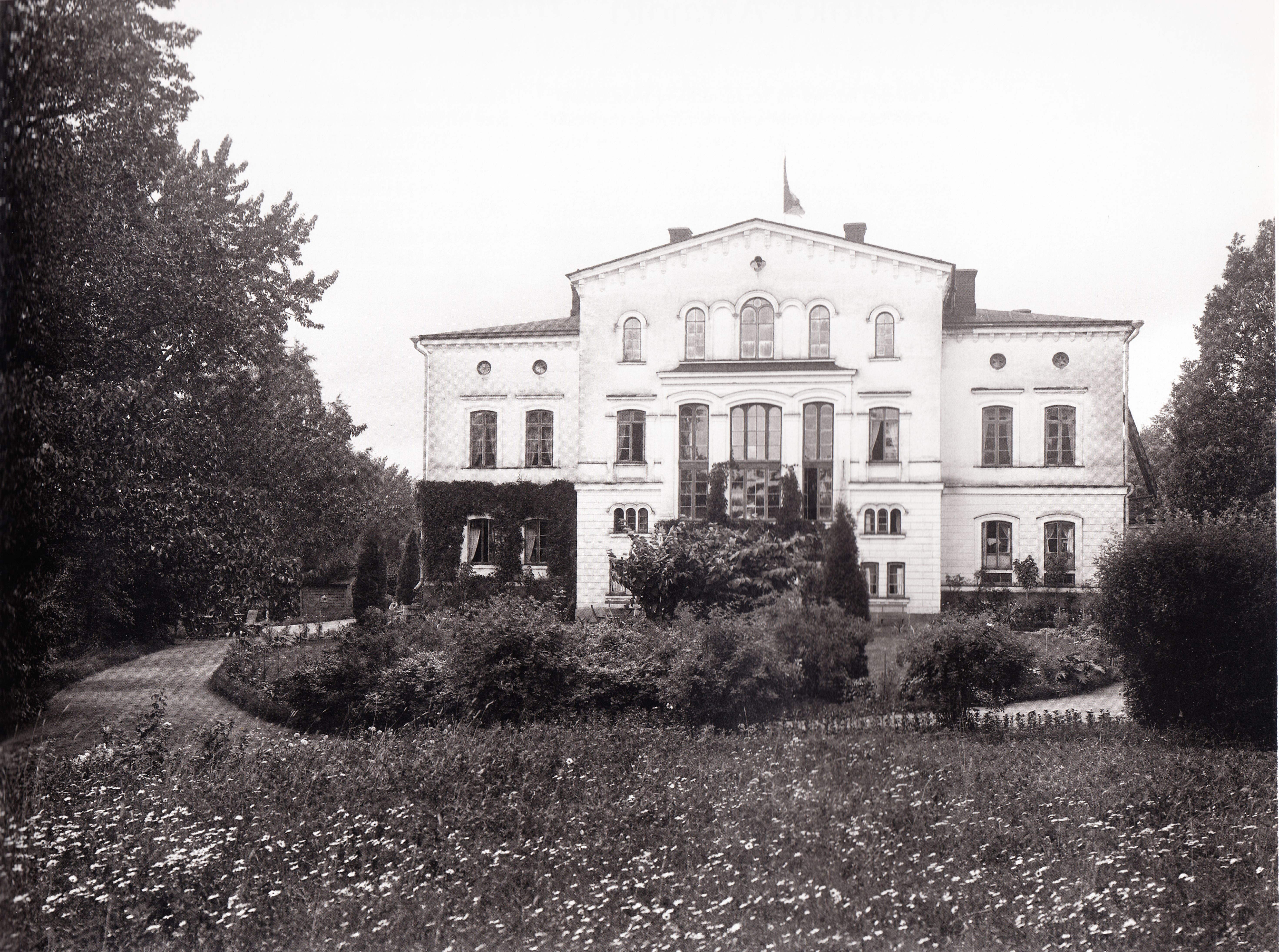 erkylän kartano